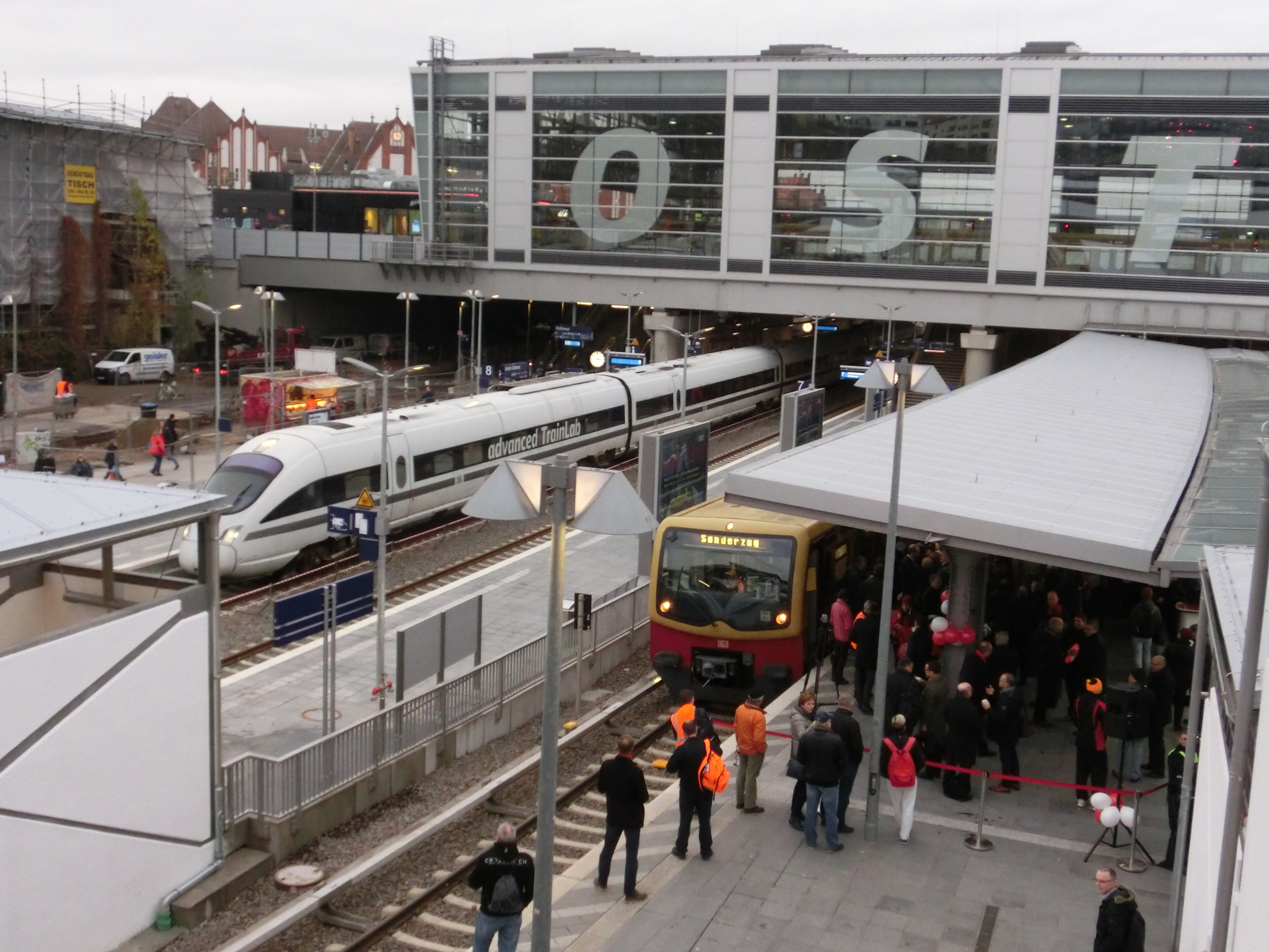 Triebzug 5517 der DB Systemtechnik als advanced TrainLab in Berlin-Ostkreuz am Gleis 8 anlässlich der offiziellen Eröffnungsveranstaltung des neuen umgebauten Bahnhofs Berlin-Ostkreuz am 06. Dezember 2018. Mit dem Zug reisten verschiedene Pressevertreter, Persönlichkeiten von Stadt / Land und Verkehrsverbund sowie der Bahnchef Richard Lutz persönlich zur feierlichen Eröffnung des letzten Bauabschnitts der Deutschen Bahn am Ostkreuz an.